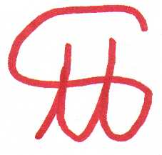 Gammelt tegn for vægtenheden pund.